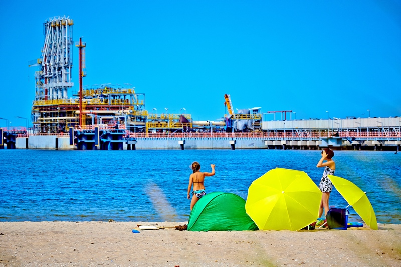 Terminal LNG w Swinoujsciu